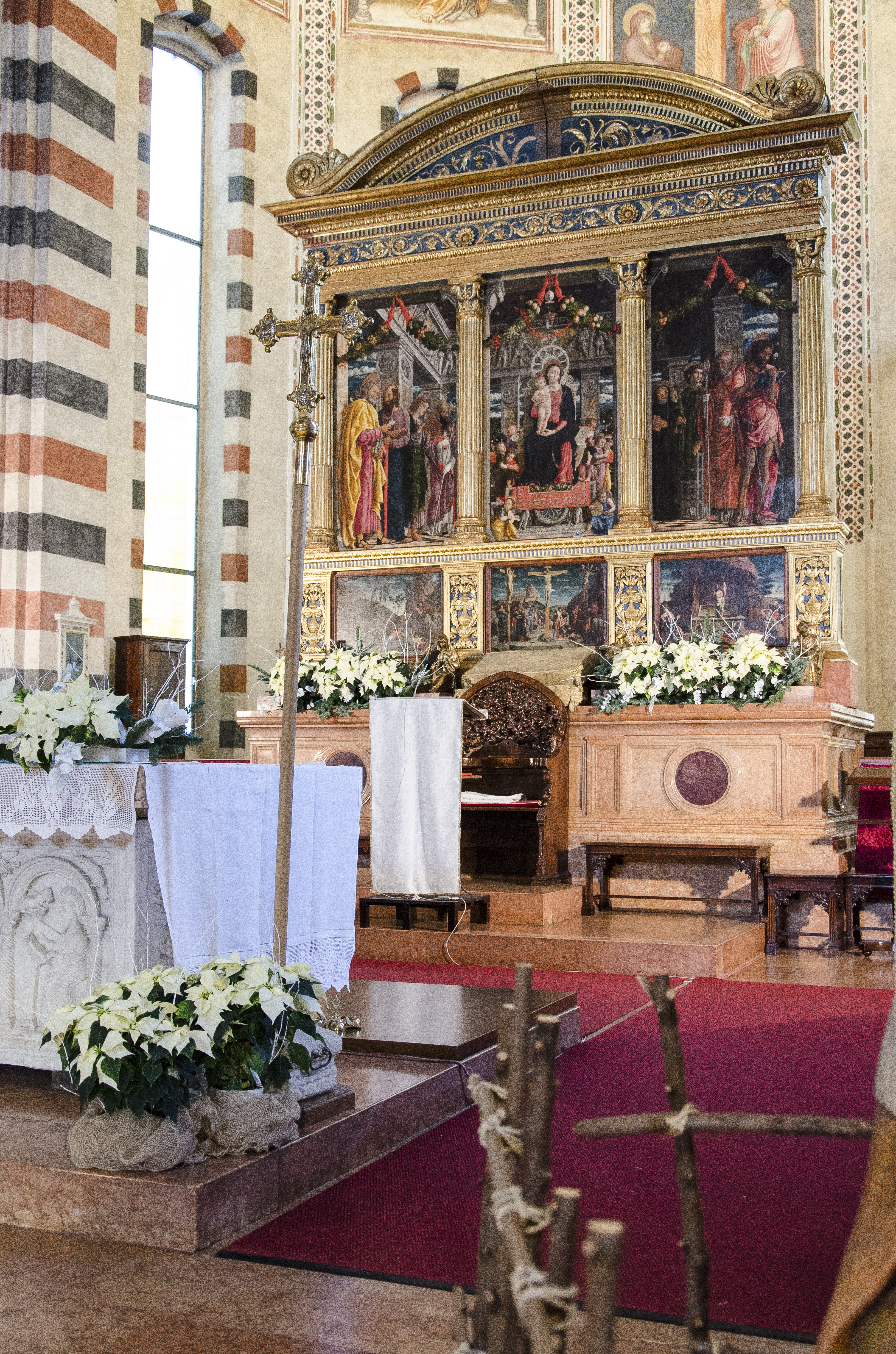 Foto degli interni della chiesa